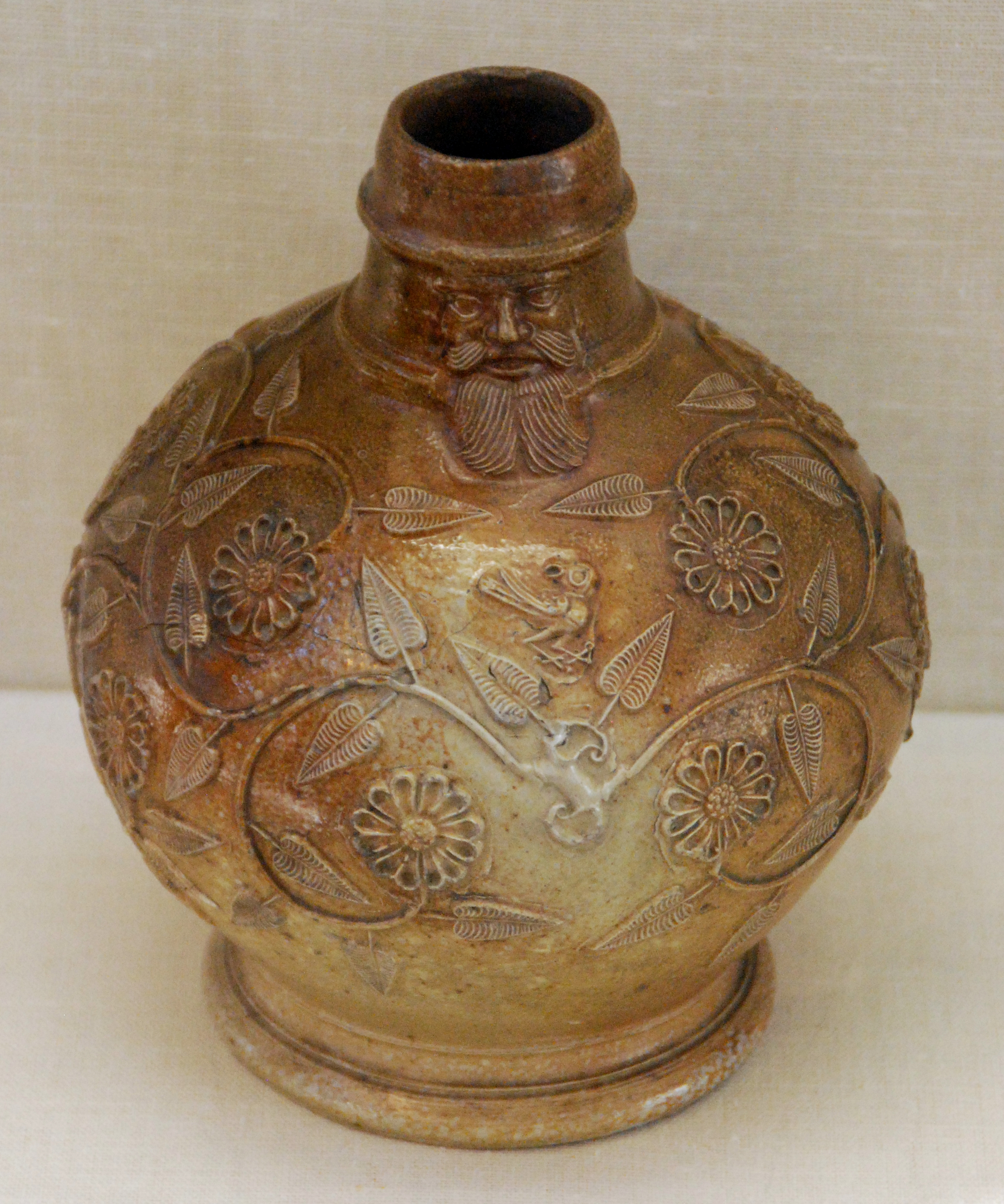 Kölner Steinzeug-Bartmannskrug, um 1550; heute im Museum August-Kestner in Hannover, Inventarnummer 1913.16, Geschenk der Erben Oppler